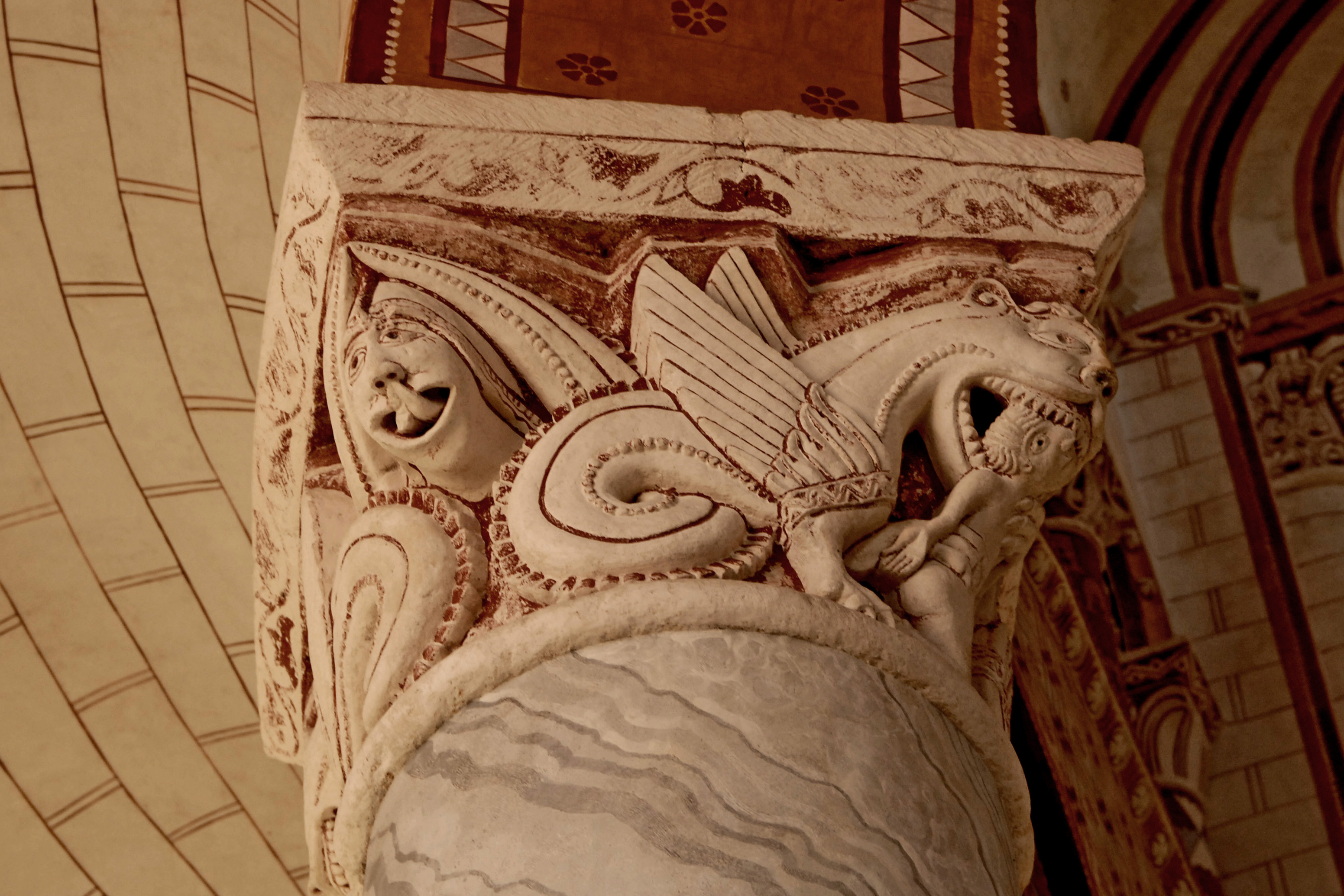 Kapitell III